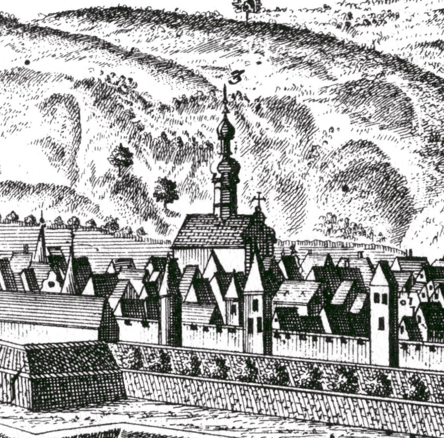 Bonn, Stadtansicht von Nordwesten, Anfang 18. Jahrhundert, Ausschnitt: Kloster Engelthal